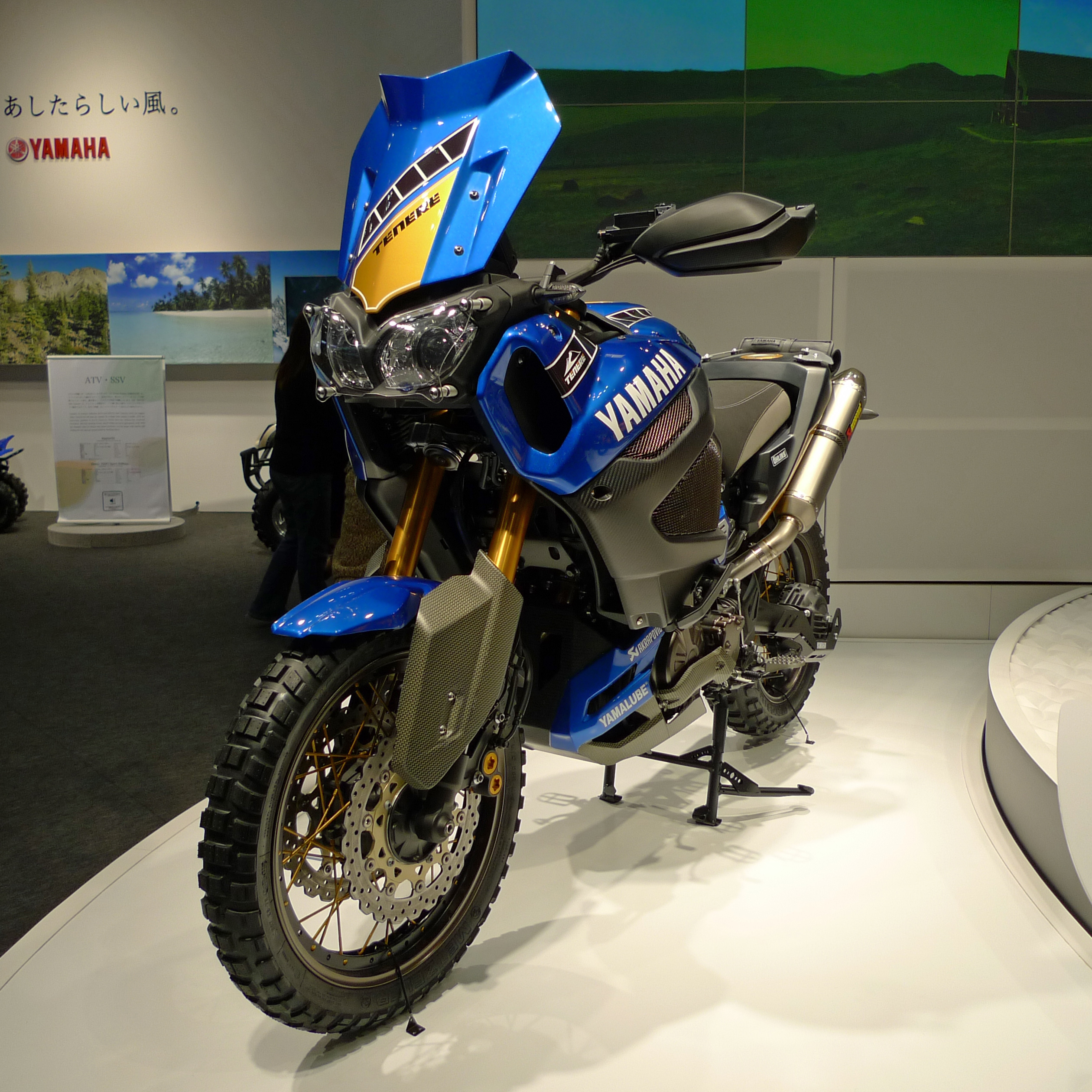 ヤマハ・スーパーテネレ ワールドクロッサー（コンセプトモデル） 東京モーターショー2011にて撮影